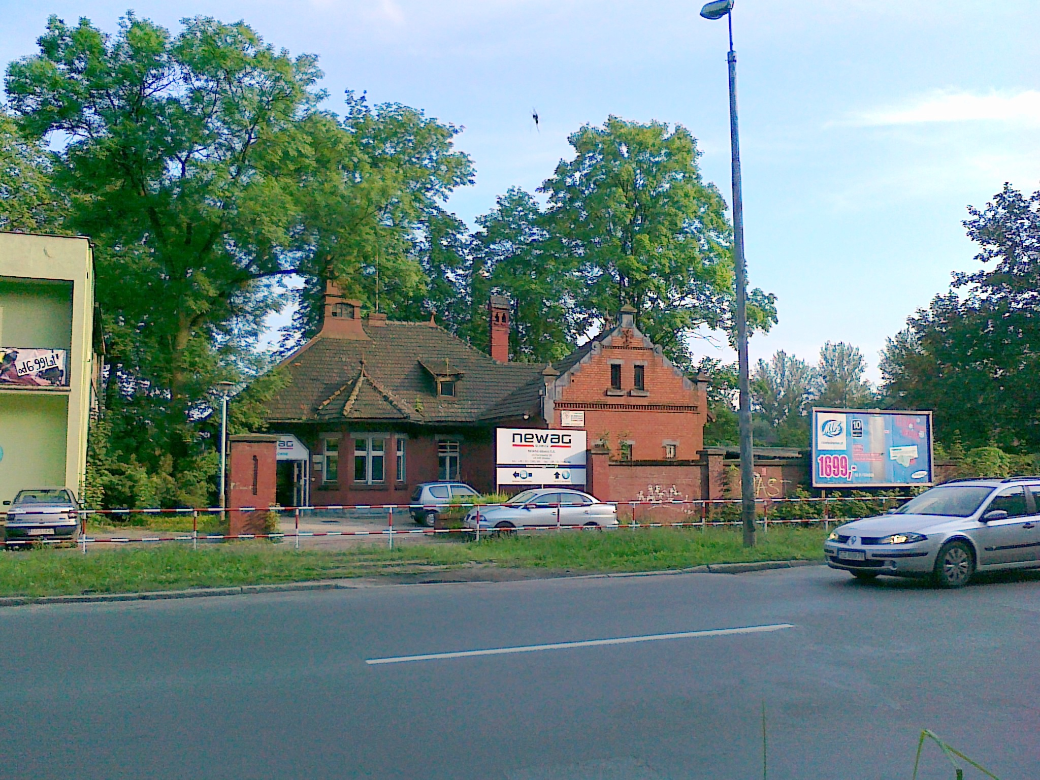 Główne wejście na terenu zakładów Newag Gliwice